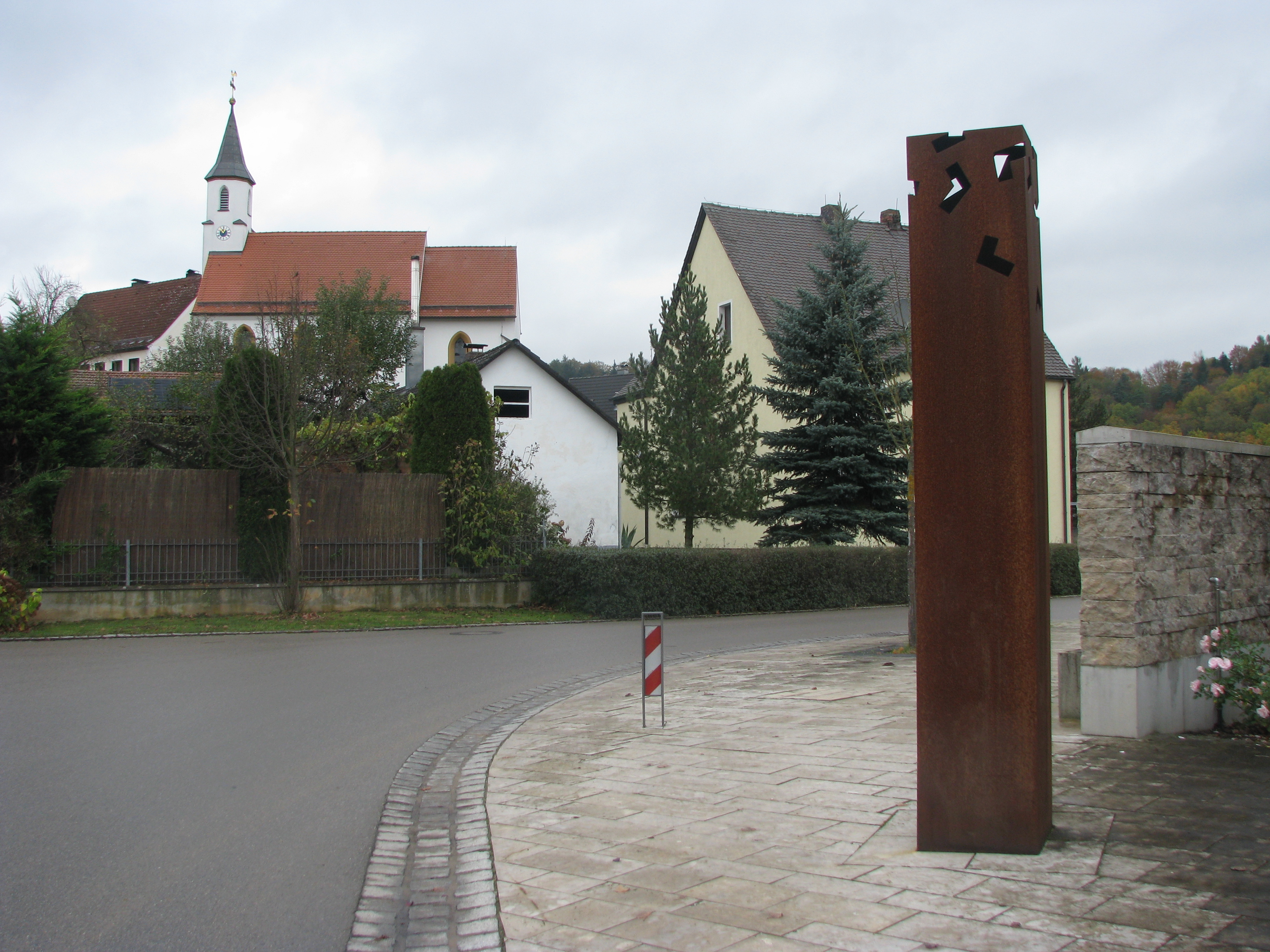 Unterölsbach, Ortsteil der Gemeinde Berg bei Neumarkt in der Oberpfalz, Kirche St. Willibald und Kunstwerk "Ein Haus für Katharina"